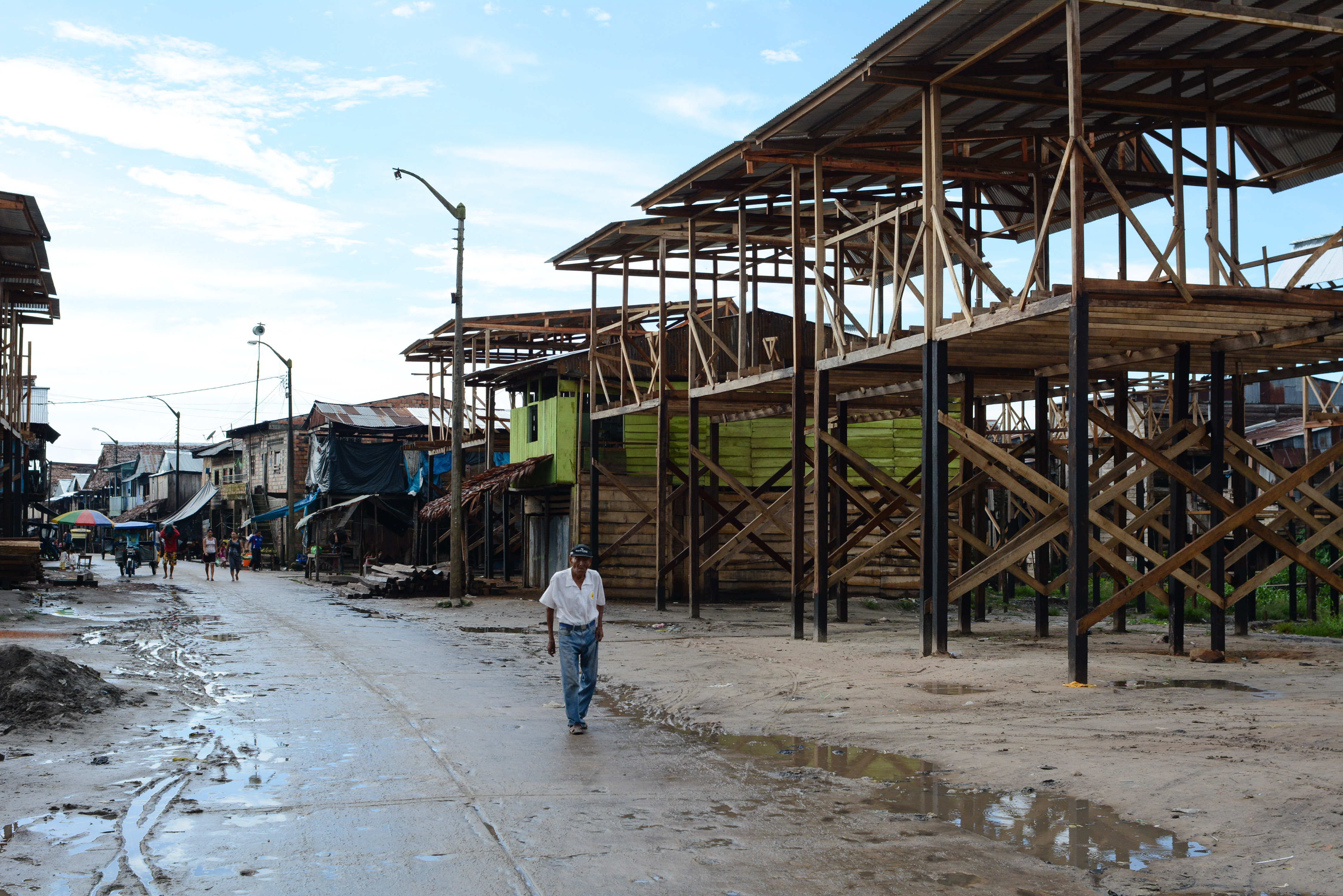 Belen, Iquitos